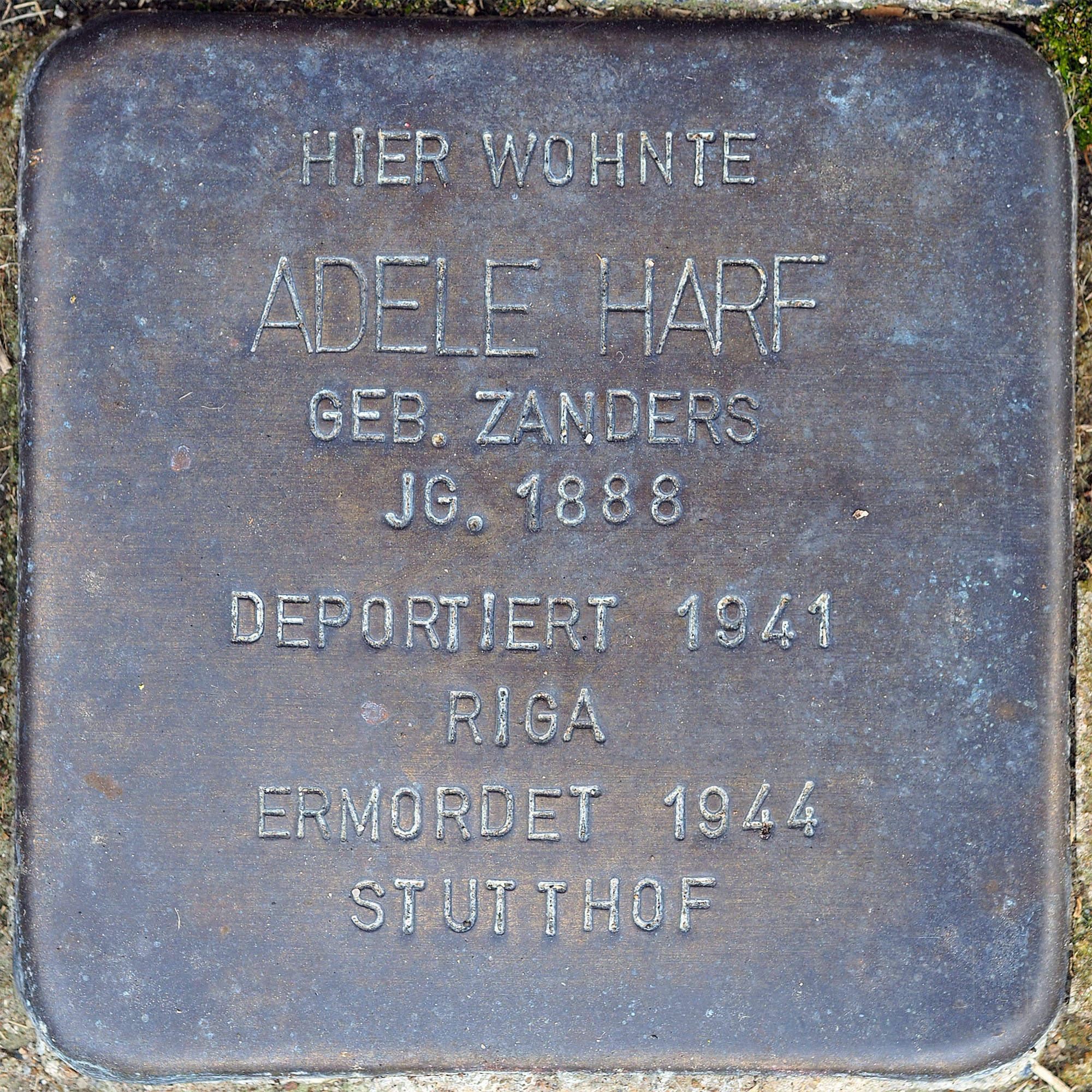 Stolpersteine MG Harf, Adele